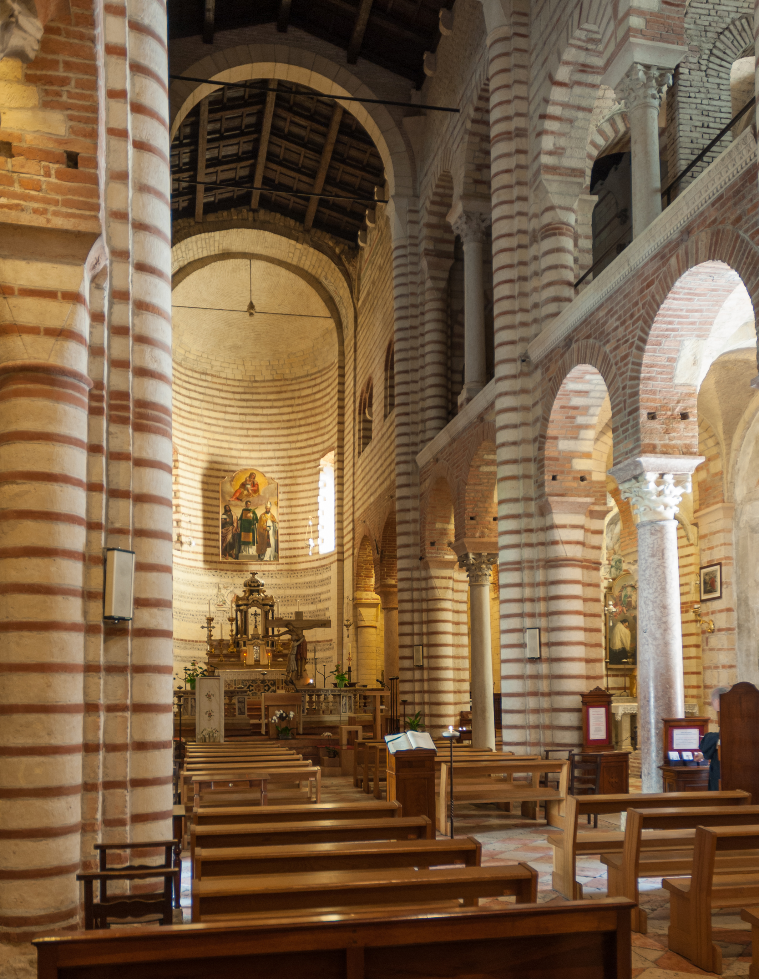 San Lorenzo a Verona, dentro